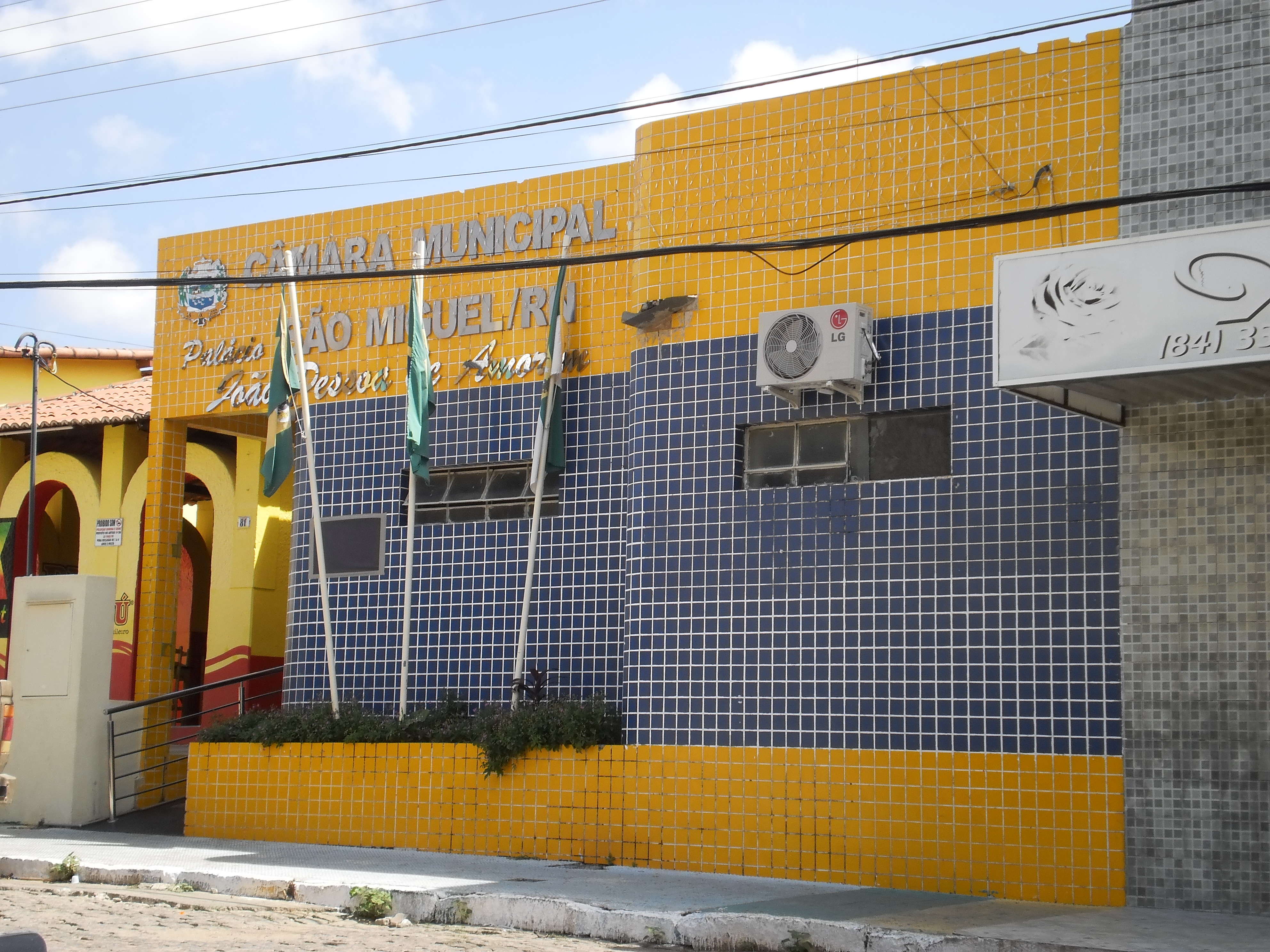 Palácio João Pessoa de Amorim, onde está situada a Câmara Municipal de São Miguel - Rio Grande do Norte, Brasil.